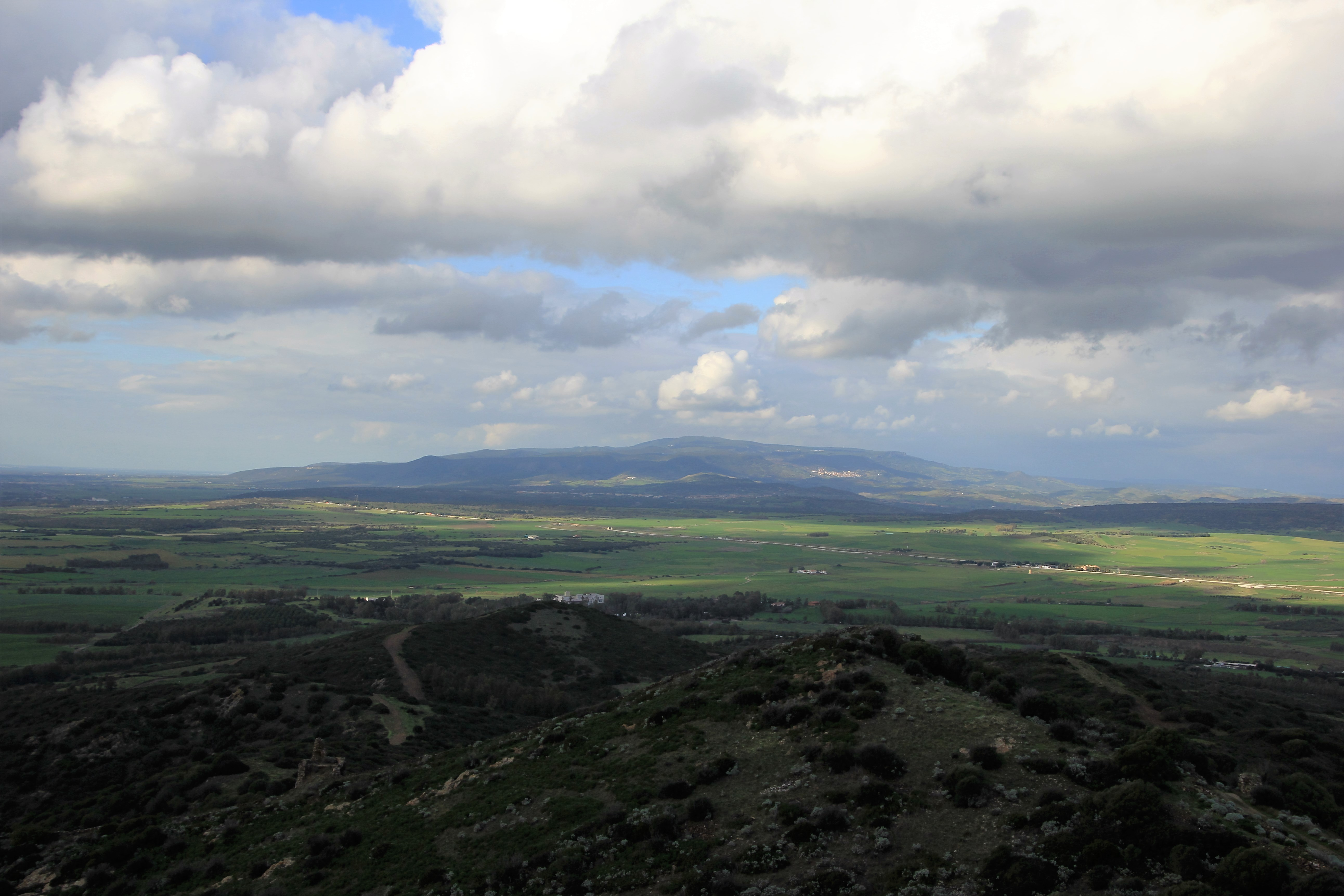 Marmilla